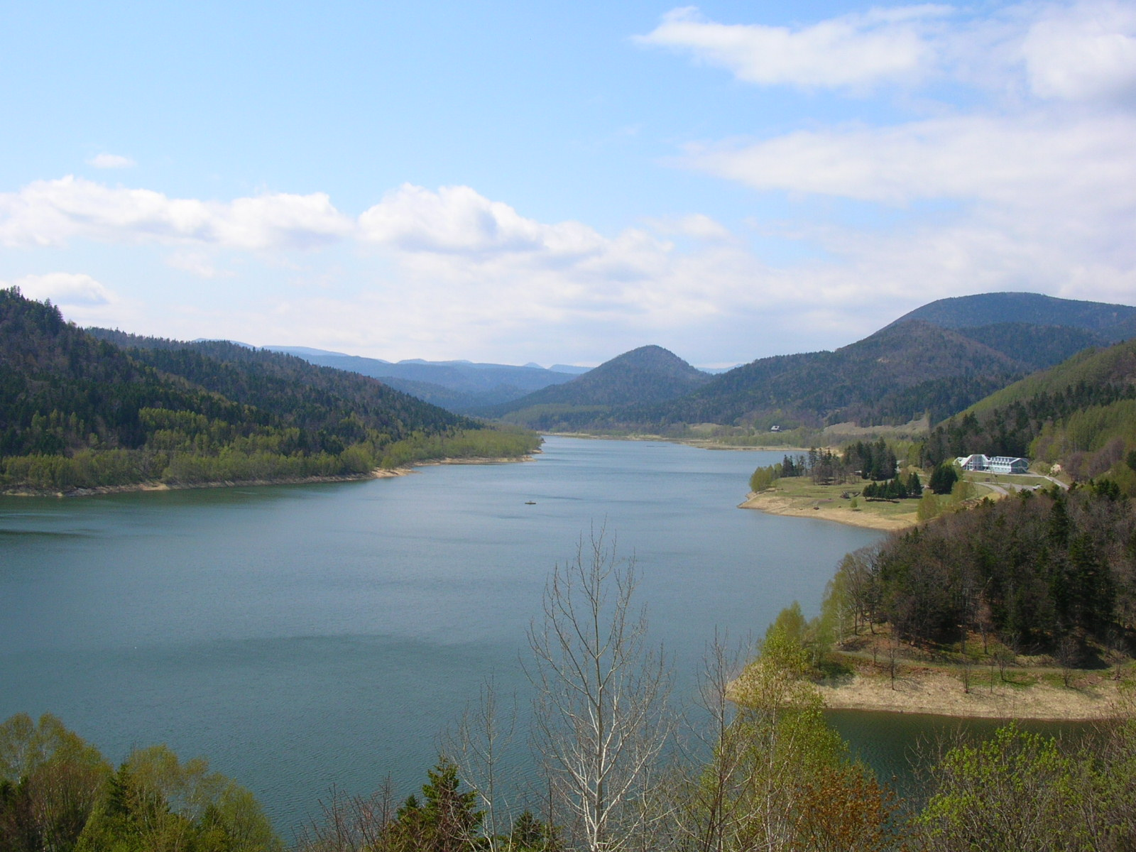 おけと湖（Lake oketo）